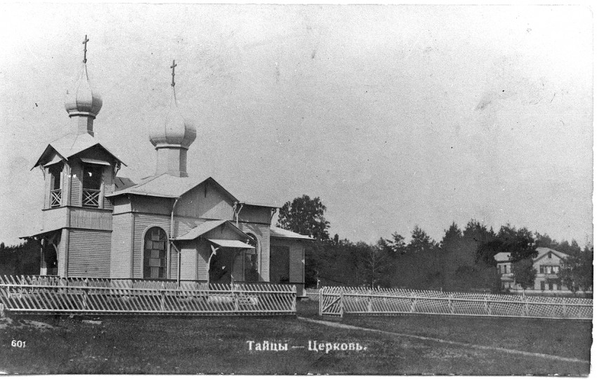 Царква Алексія мітрапаліта Маскоўскага (старая). 1910-я